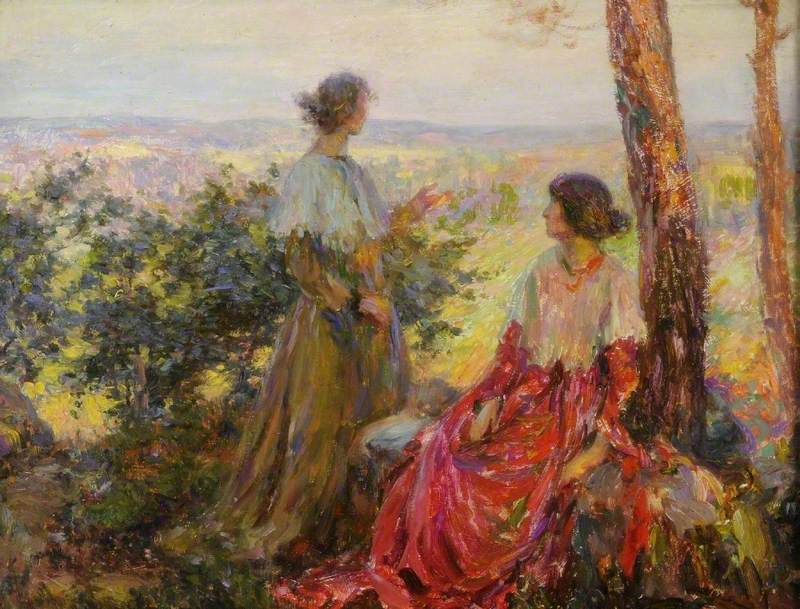 Summer Sunshine by Numa François Gillet.